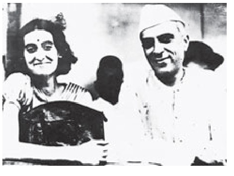 Pandit Nerhu eta Indira Gandhi. Nerhu izan zen Indiako Alderdi Nazionalaren sortzailea.